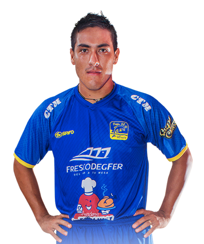 avatar